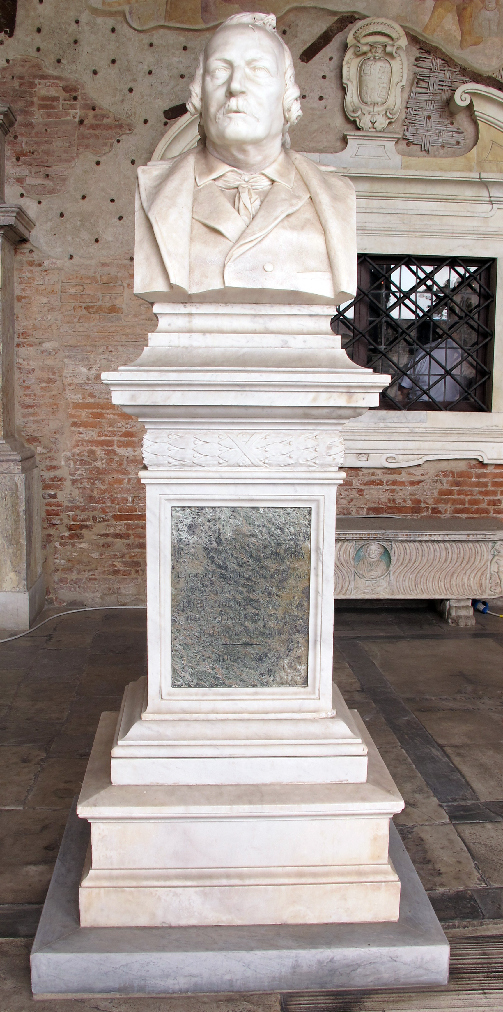 Monumento al giurista Francesco Carrara (1890).